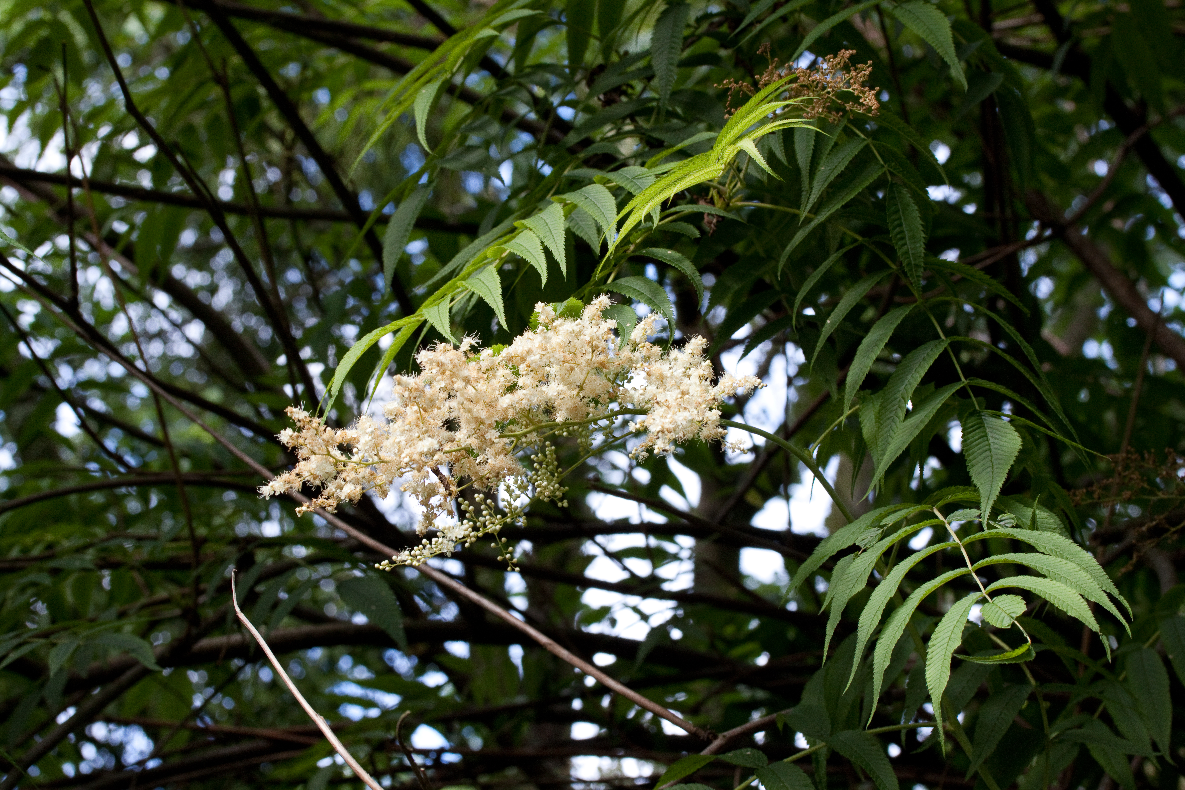 Fleurs de Sorbaria arborea - Sorbaire en arbre - au jardin botanique de Strasbourg - France